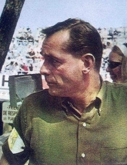 Phil Hill en 1966, 'Campioni dello Sport 1966 - 1967', Panini figurina n°77.